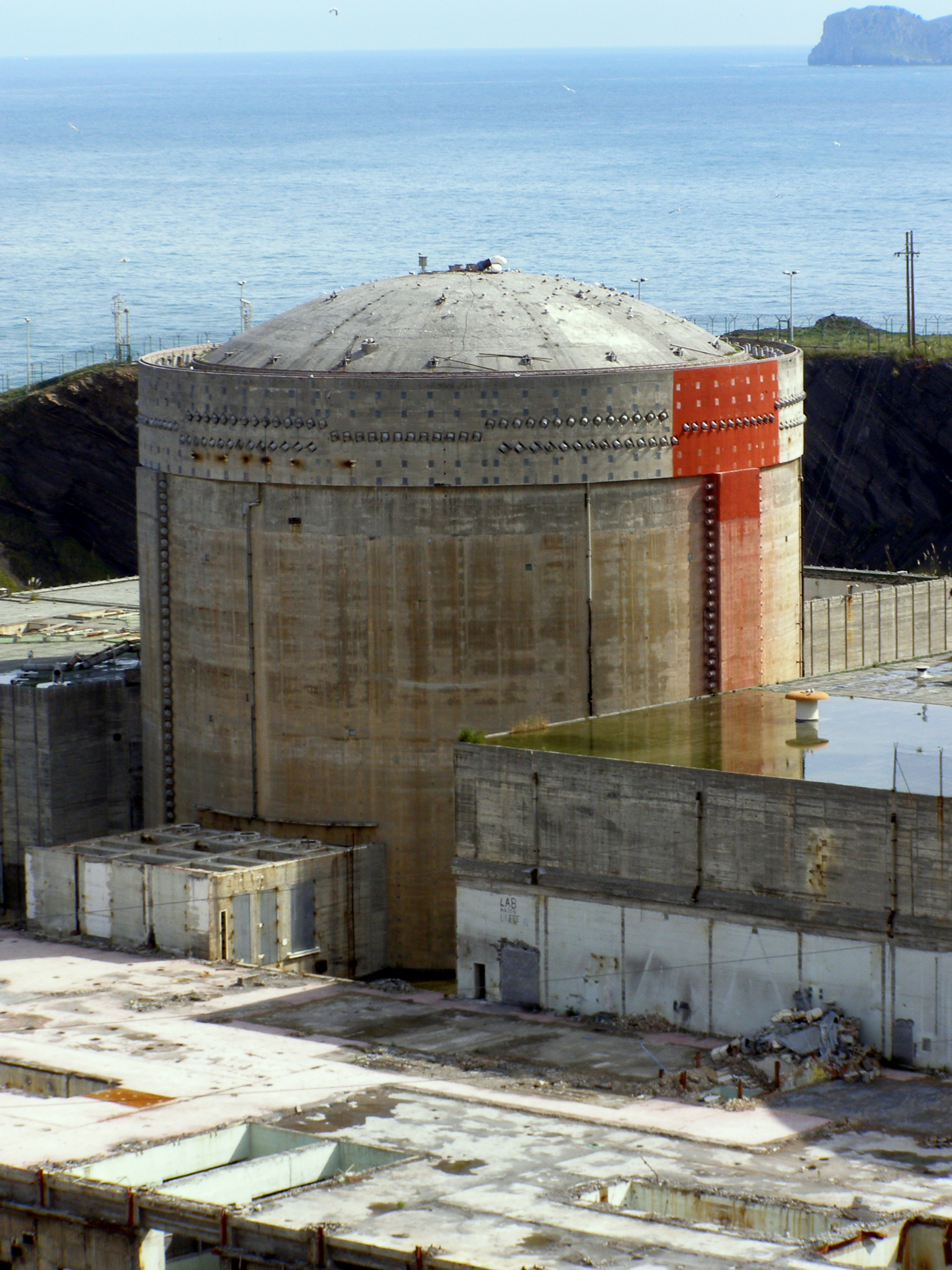 Unit 1 containment building. Edificio de contención de la unidad 1.